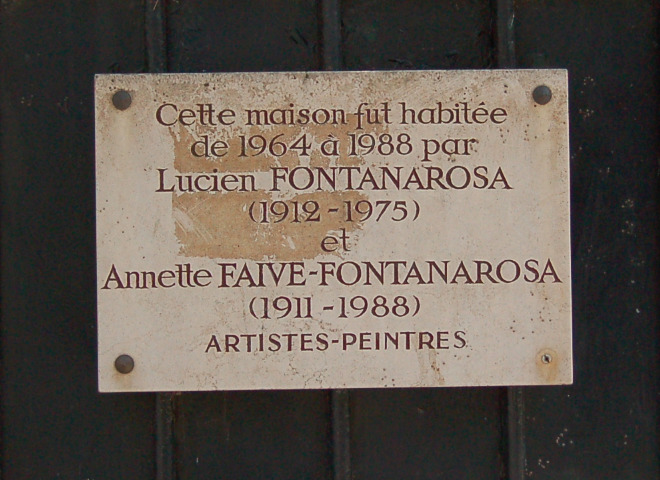 Plaque commémorative en la mémoire de Lucien et Annette Fontanarosa, Paris, 17eme, France